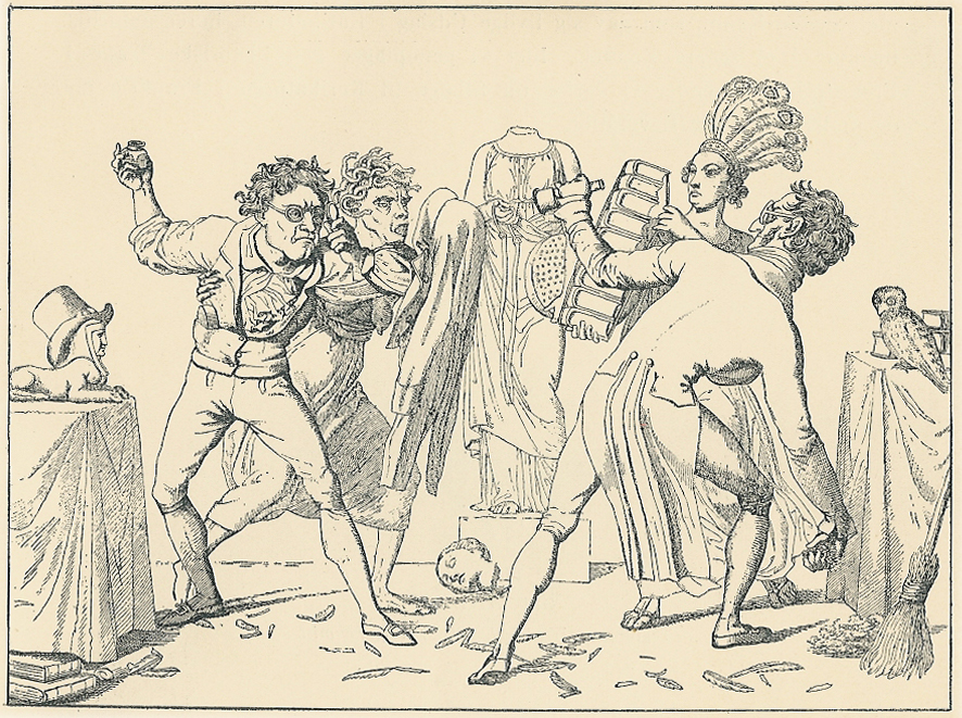 Pennefejden. Tegning af C.W. Eckersberg, stukket af Bagge 1818. Karikatur på den forbitrede litterære strid som i årene 1813-19 førtes mellem Jens Baggesen og det Øhlenschlægerske parti. Til venstre Baggesen med misundelsens gudinde ved sin side. Til højre Øhlenschlægers forsvarer Chr. Molbech, hvem hovmod står bi. I baggrunden Fornuftens hovedløse statue.